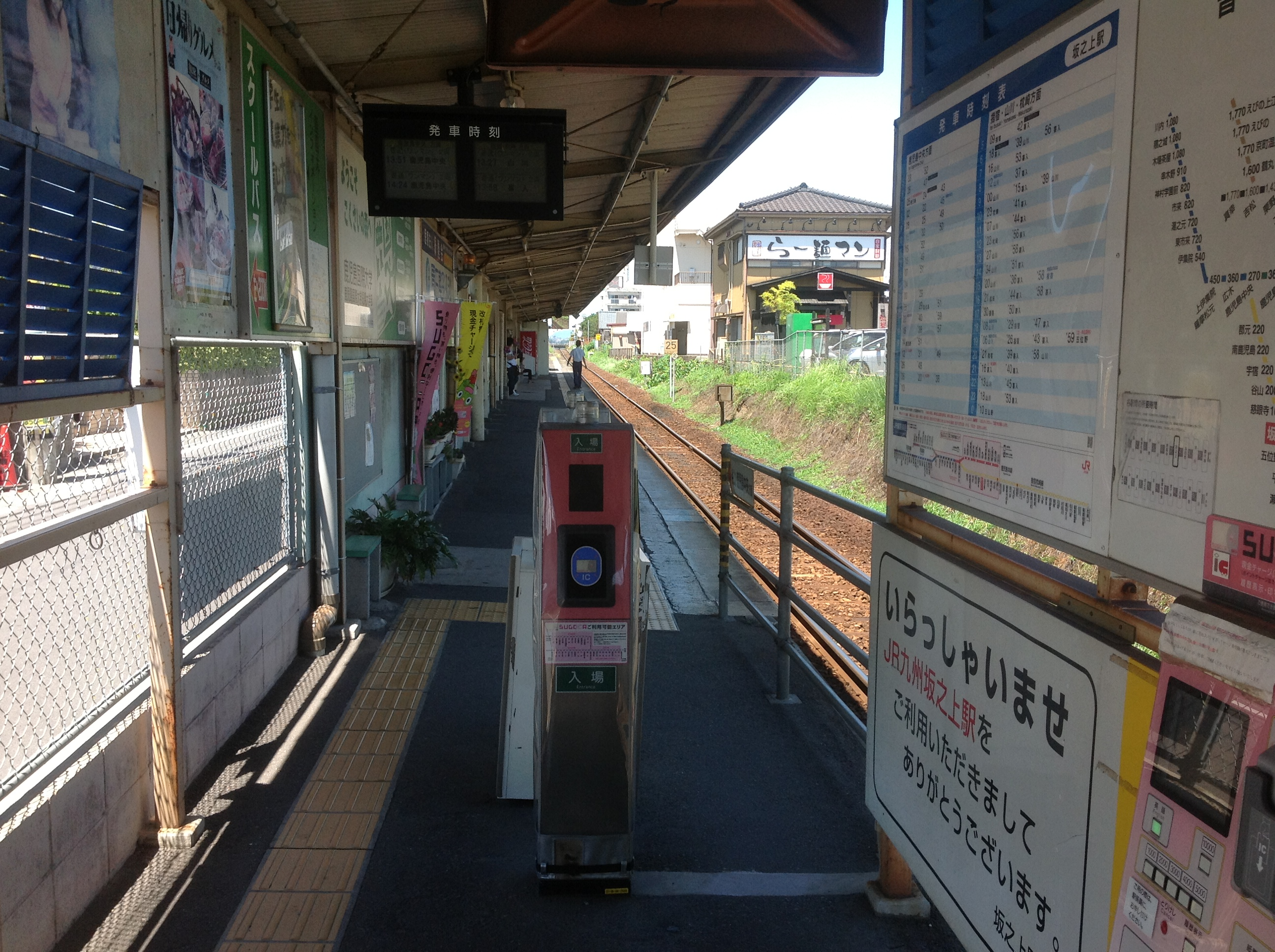 坂之上駅改札